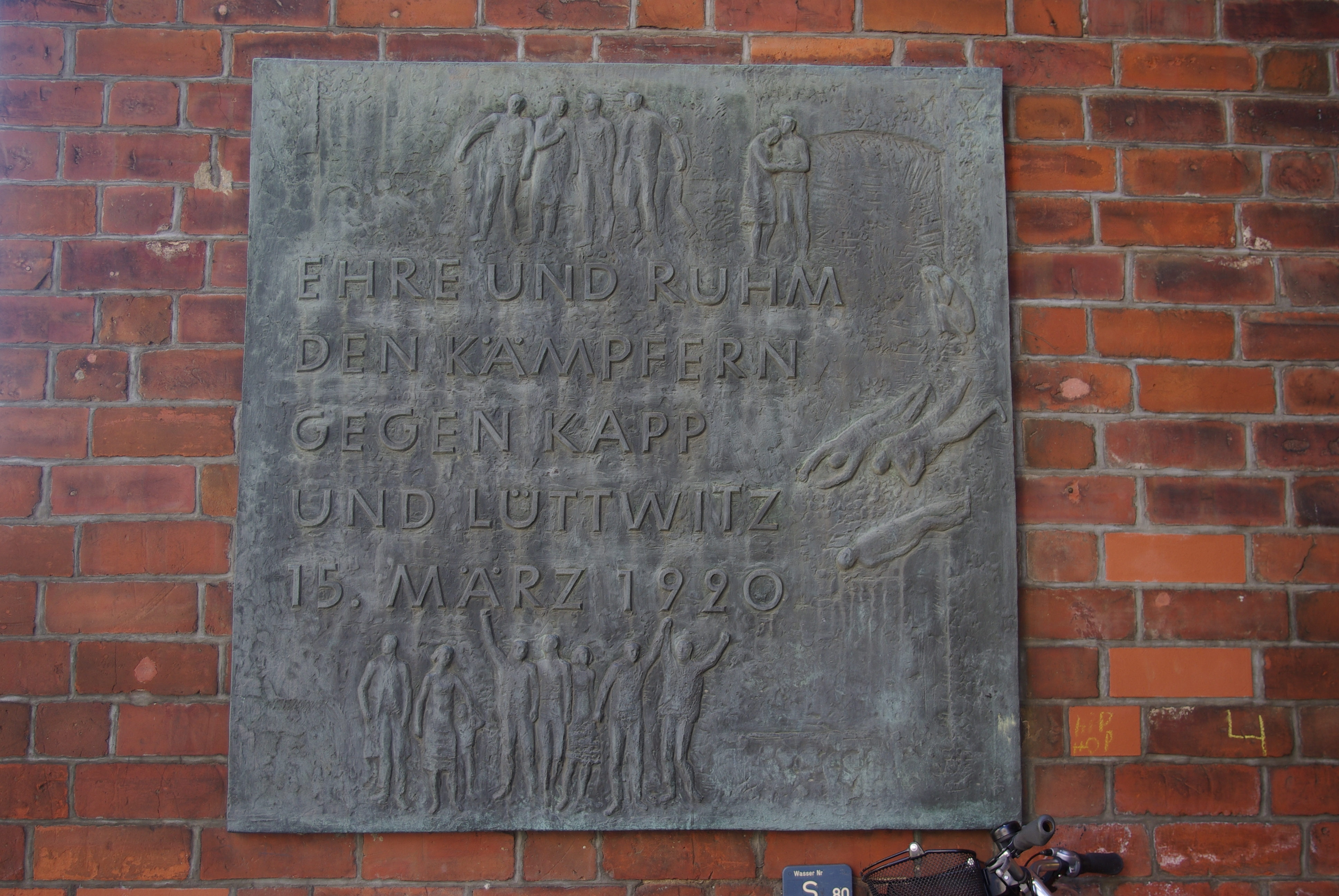 Cottbus in Brandenburg. Die Gedenktafel an den Widerstand des Kappputsche befindet sich am Spremberger Turm in Cottbus. Die Tafel ist denkmalgeschützt.